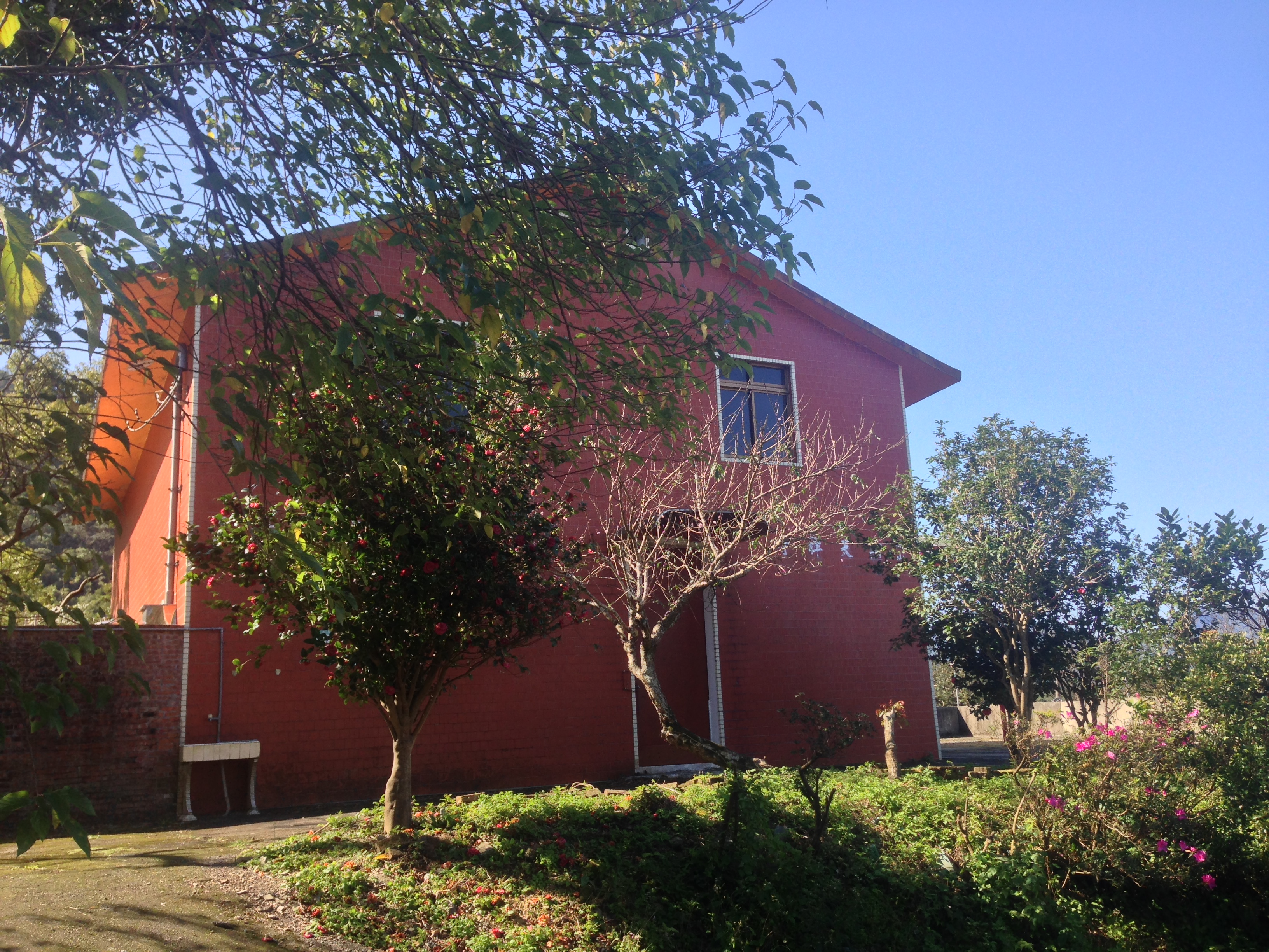 中文（台灣）: 無天禪寺側拍